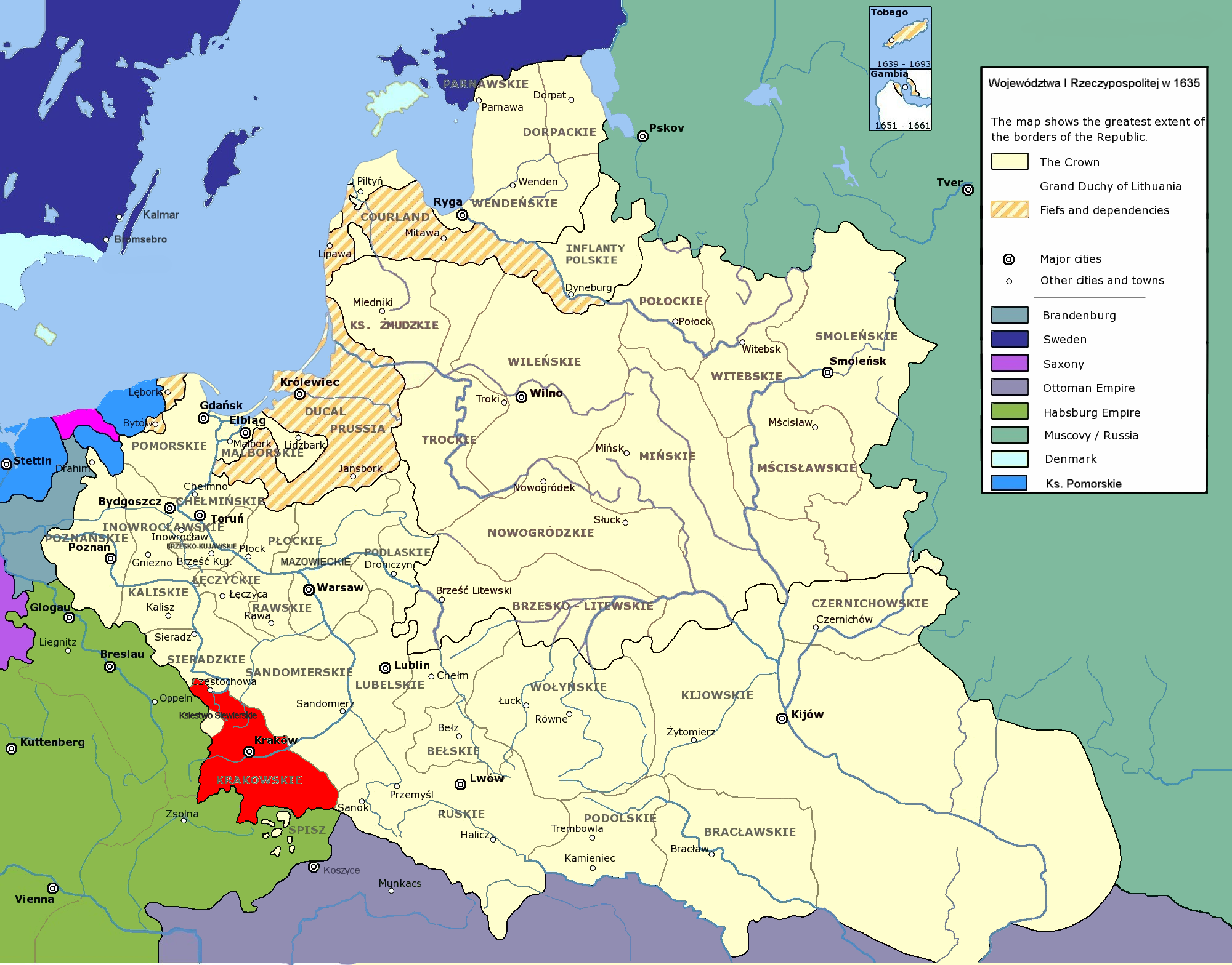 Rzeczpospolita Obojga Narodów w 1635 r.; województwo krakowskie Polish-Lithuanian Commonwealth in 1635; Kraków Voivodeship